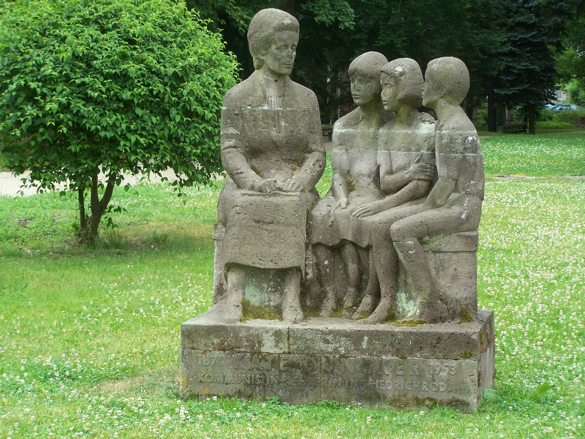 Das Käte-Duncker-Denkmal im Kurpark Friedrichroda (2008)